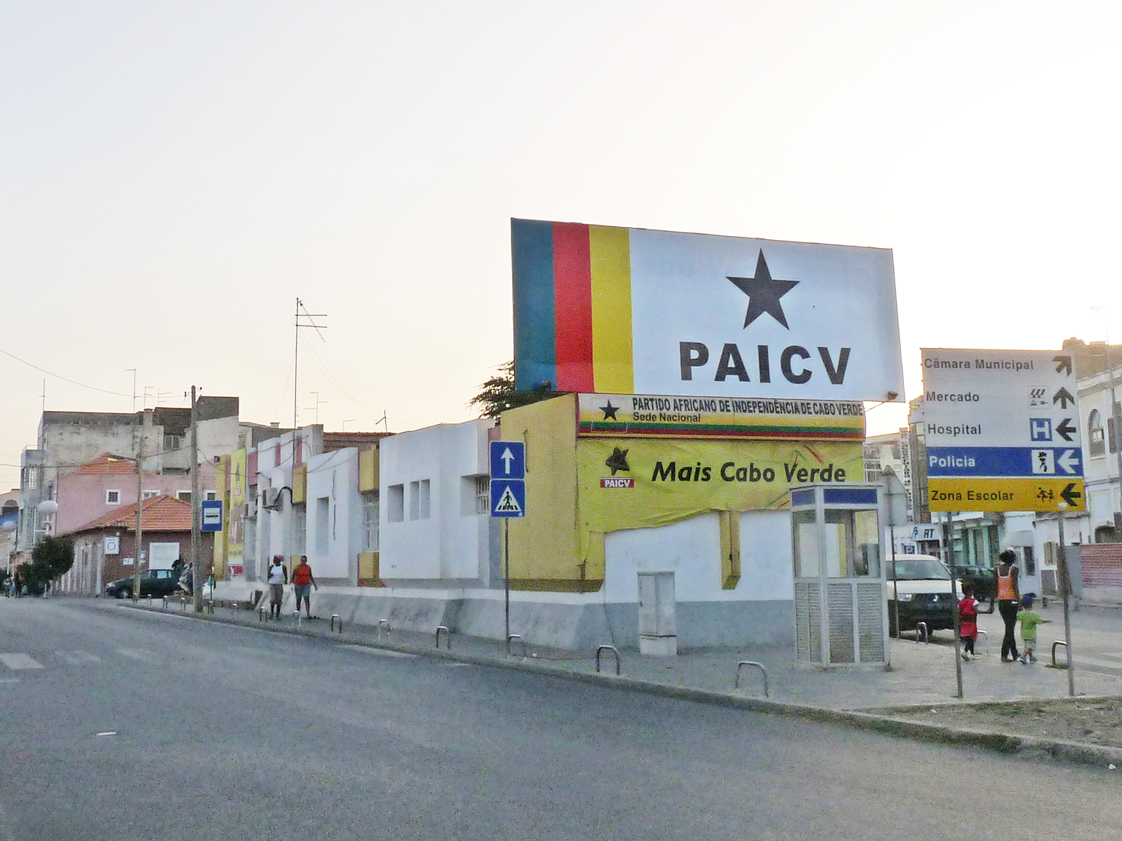 Praia (Cap-Vert) : siège du PAICV